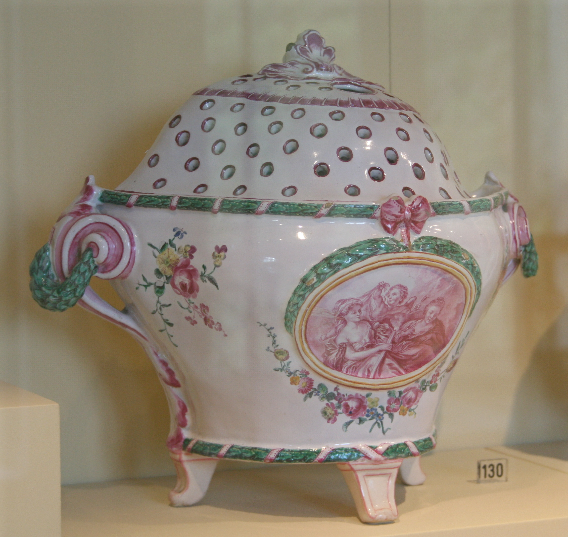 Musée de la faïence àMarseille. Pot pourri ou bouquetier d'applique en faïence stannifère, décor petit feu polychrome pourpre, jaune, vert, bleu et brun des ateliers de Gaspard Robert. Décor central en camaïeu pourpre. Hauteur=29cm. Longueur=38cm. Profondeur=16cm.